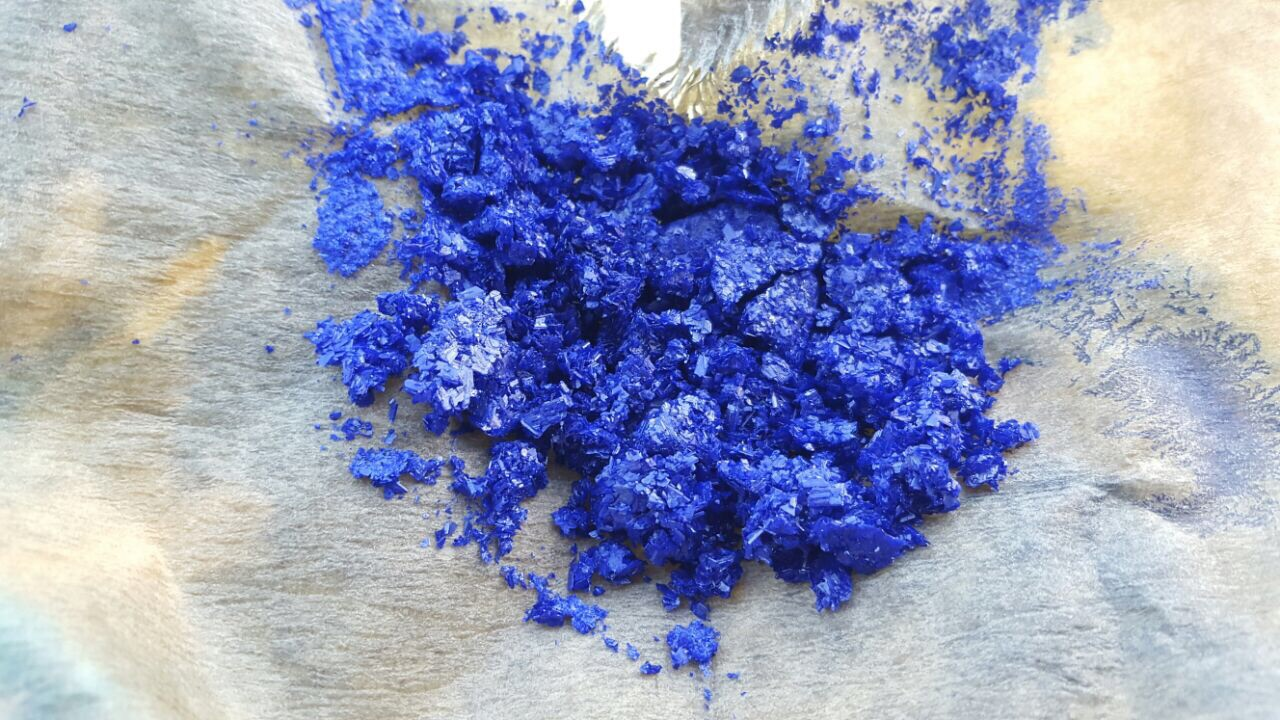 Feuchte Tetramminkupfer(II)-nitrat Kristalle